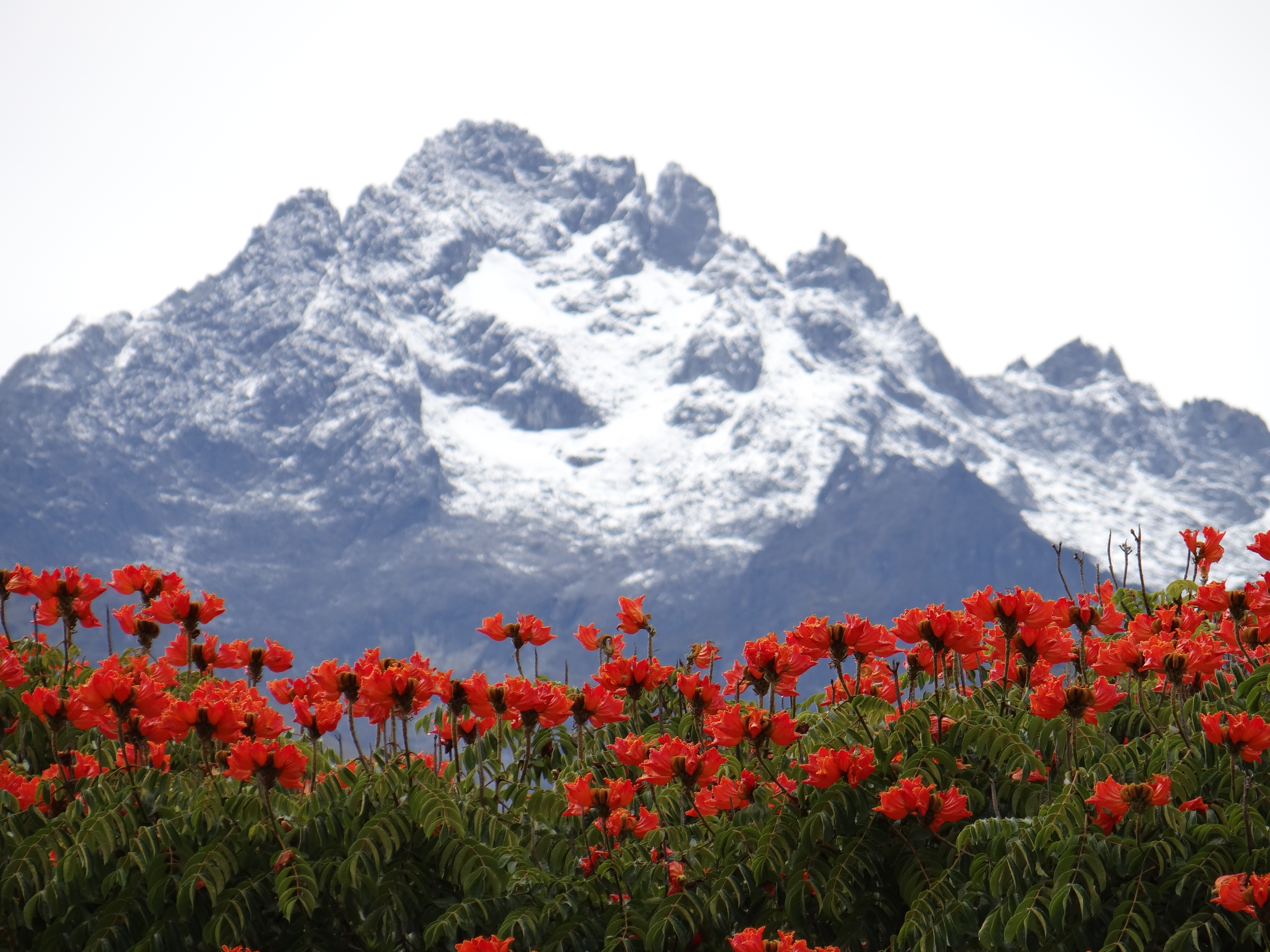 Vista del Pico Bolívar, Mérida. Captada desde el Parque La Isla.